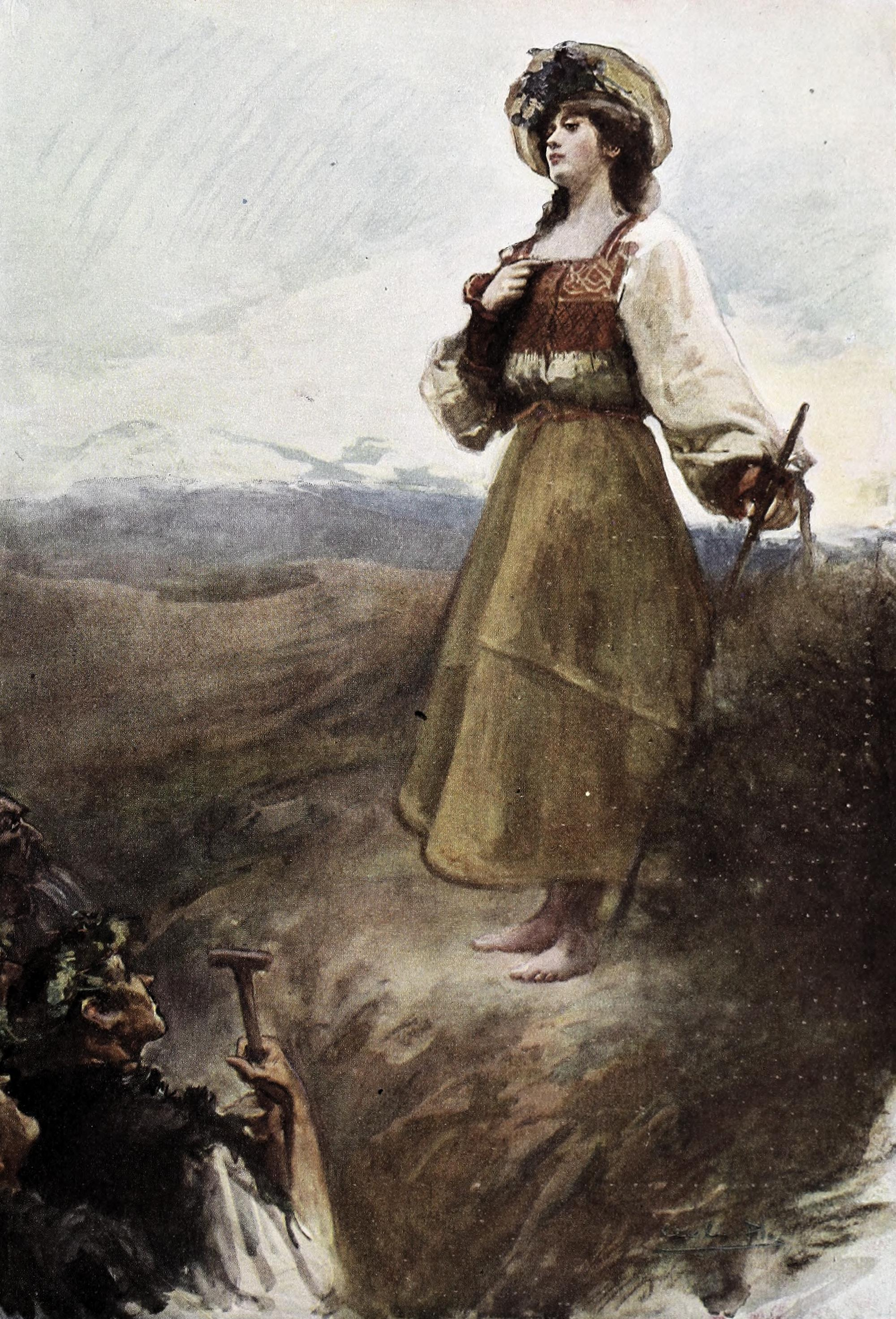 Figuras quijotescas. La pastora Marcela.